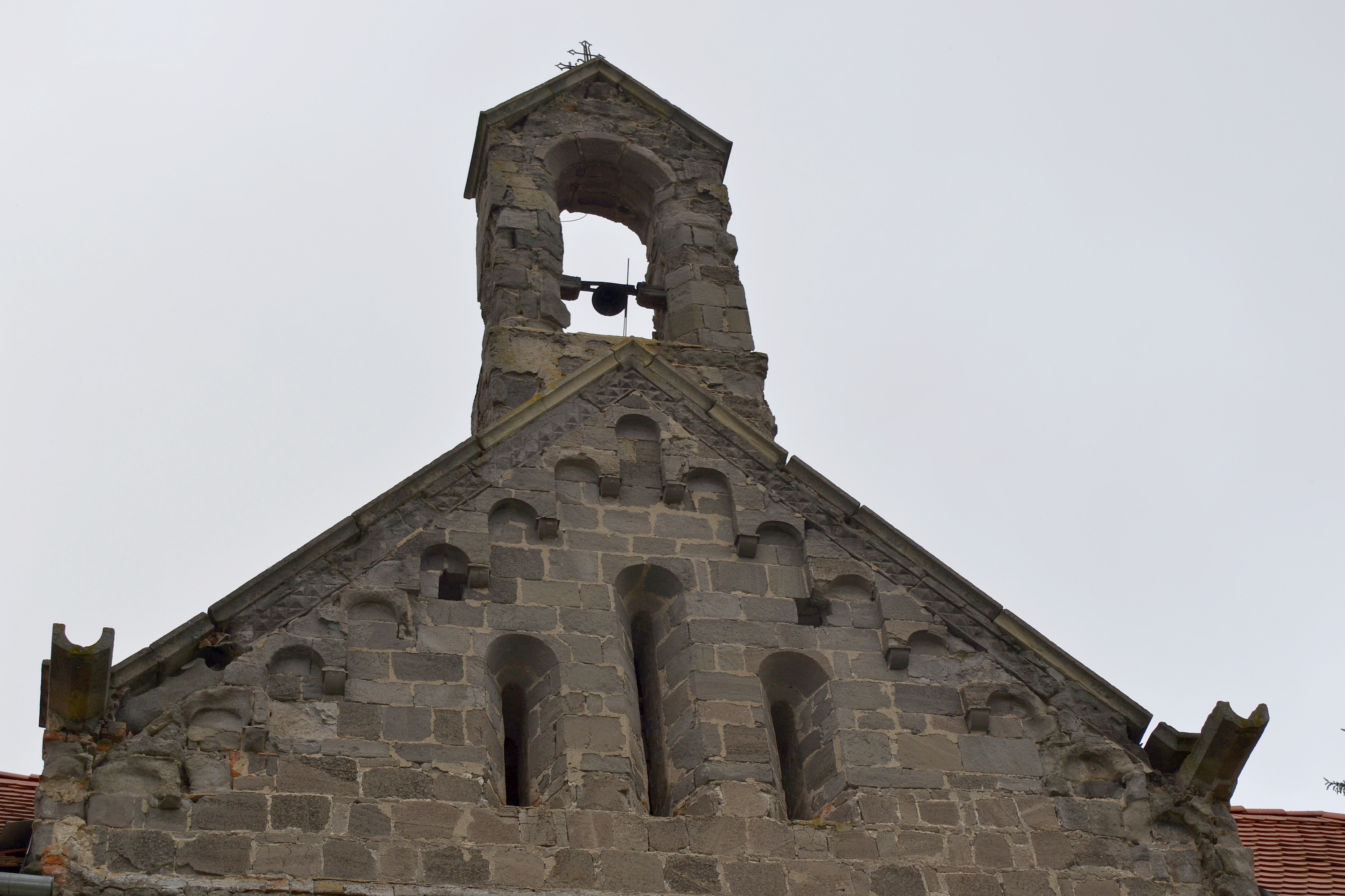 Detail zvonice